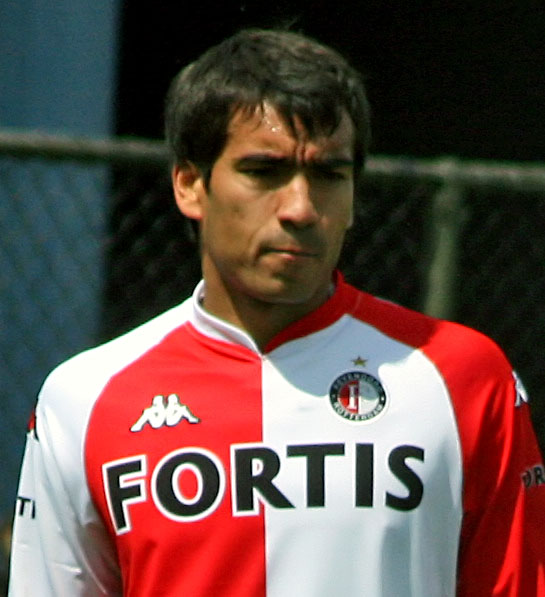 Giovanni van Bronckhorst (Feyenoord)